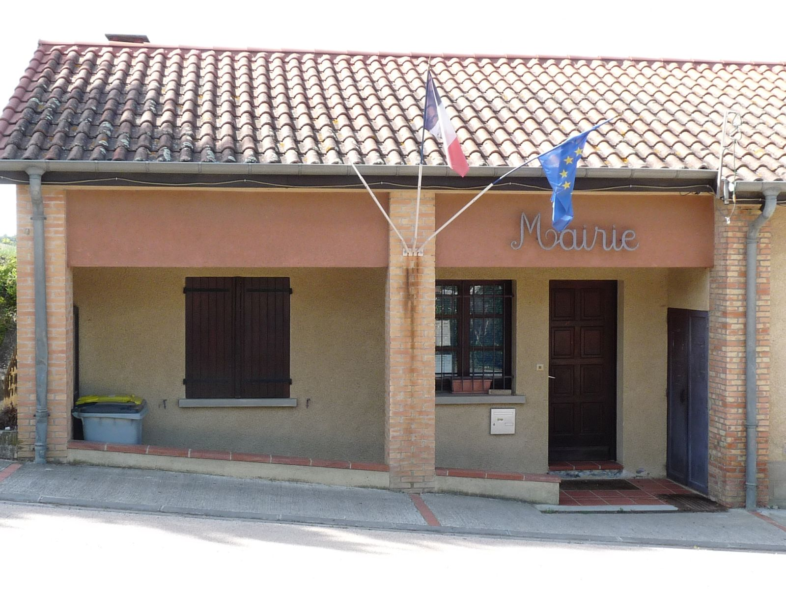 Mairie de Belbèze-de-Lauragais, Haute-Garonne, France